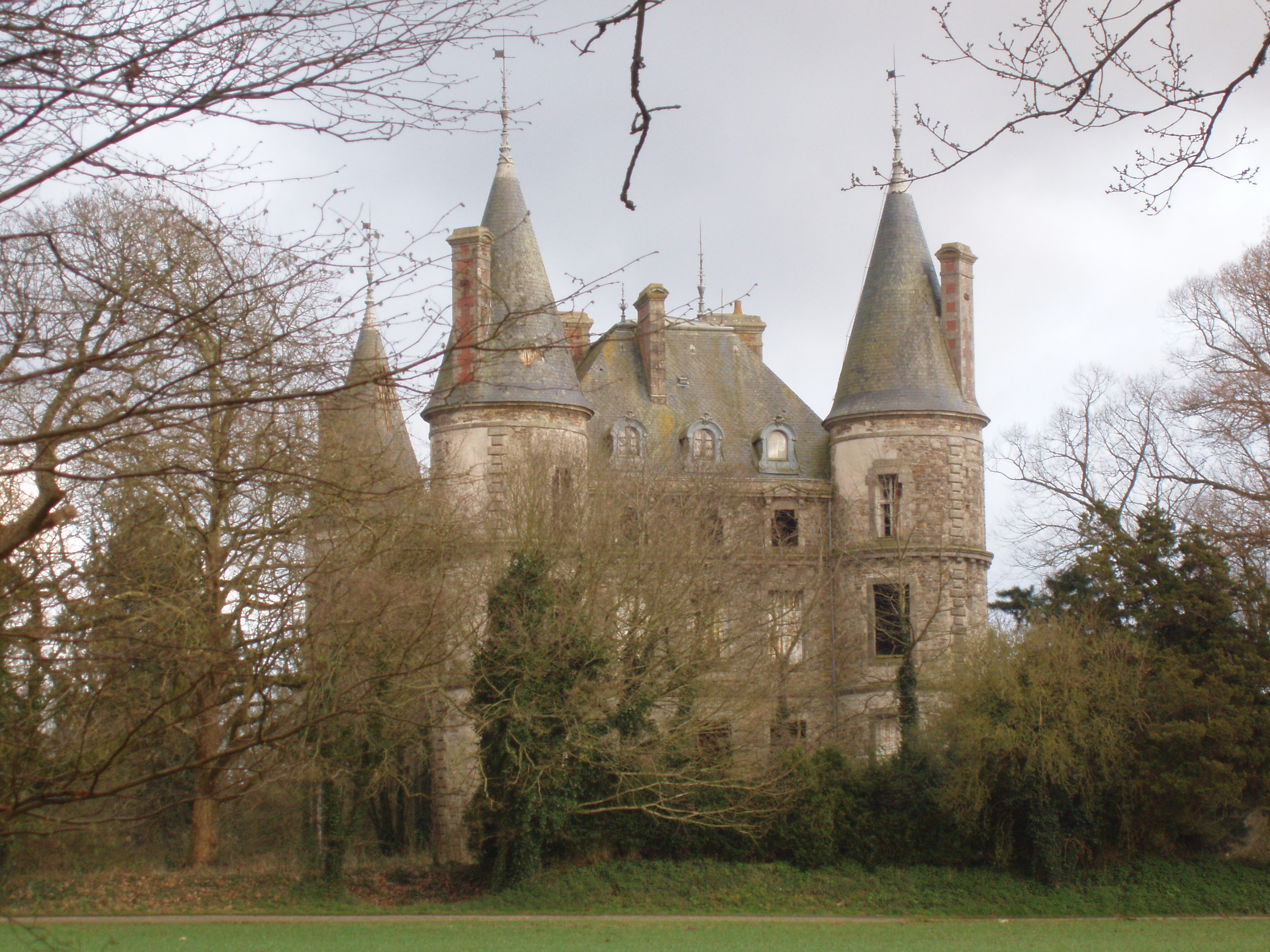 La magnifique forêt de Coat-an-Noz et son château remarquable, Belle-Isle-en-Terre, Côtes-d'Armor, Bretagne.